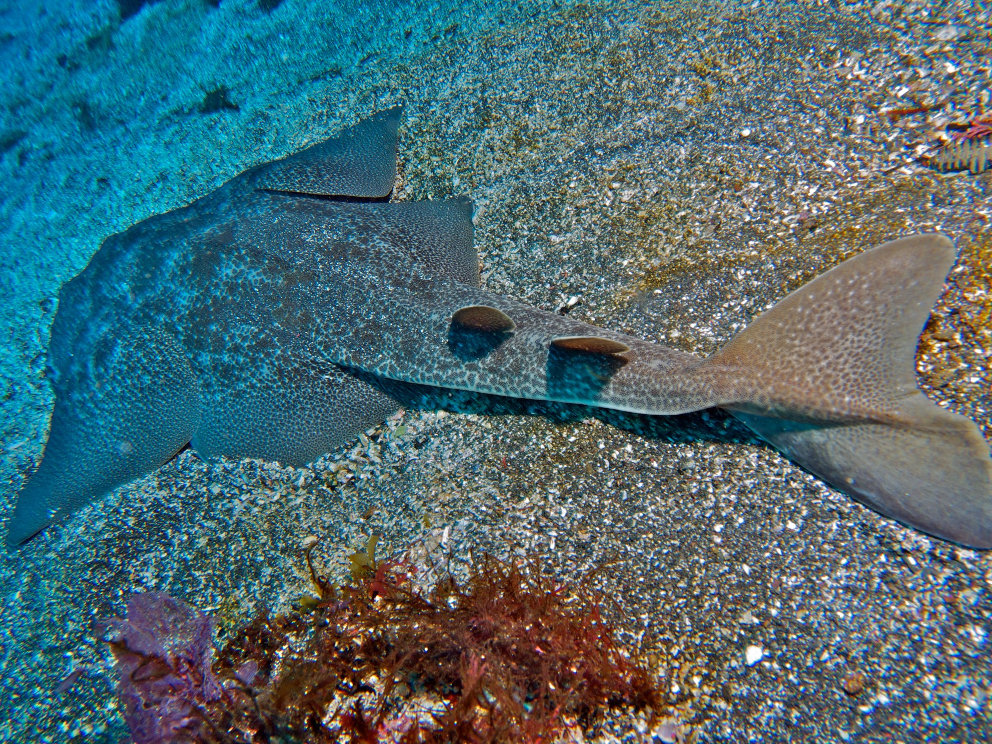 Japanese angelshark (Squatina japonica)